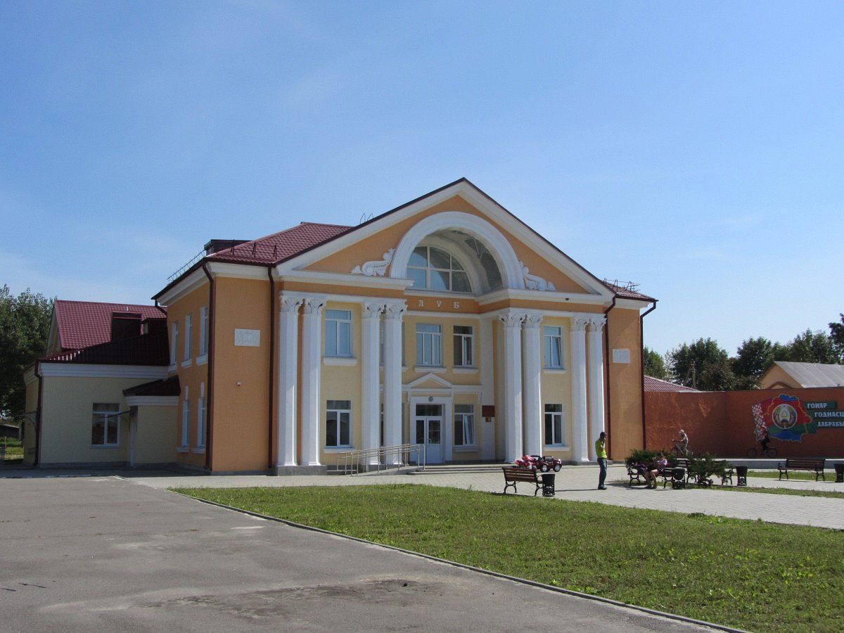 Буда-Кашалёва. Клуб